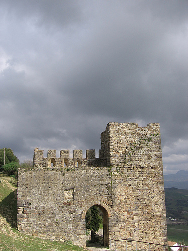 Castillo de Jimena de la Frontera, Cádiz, España